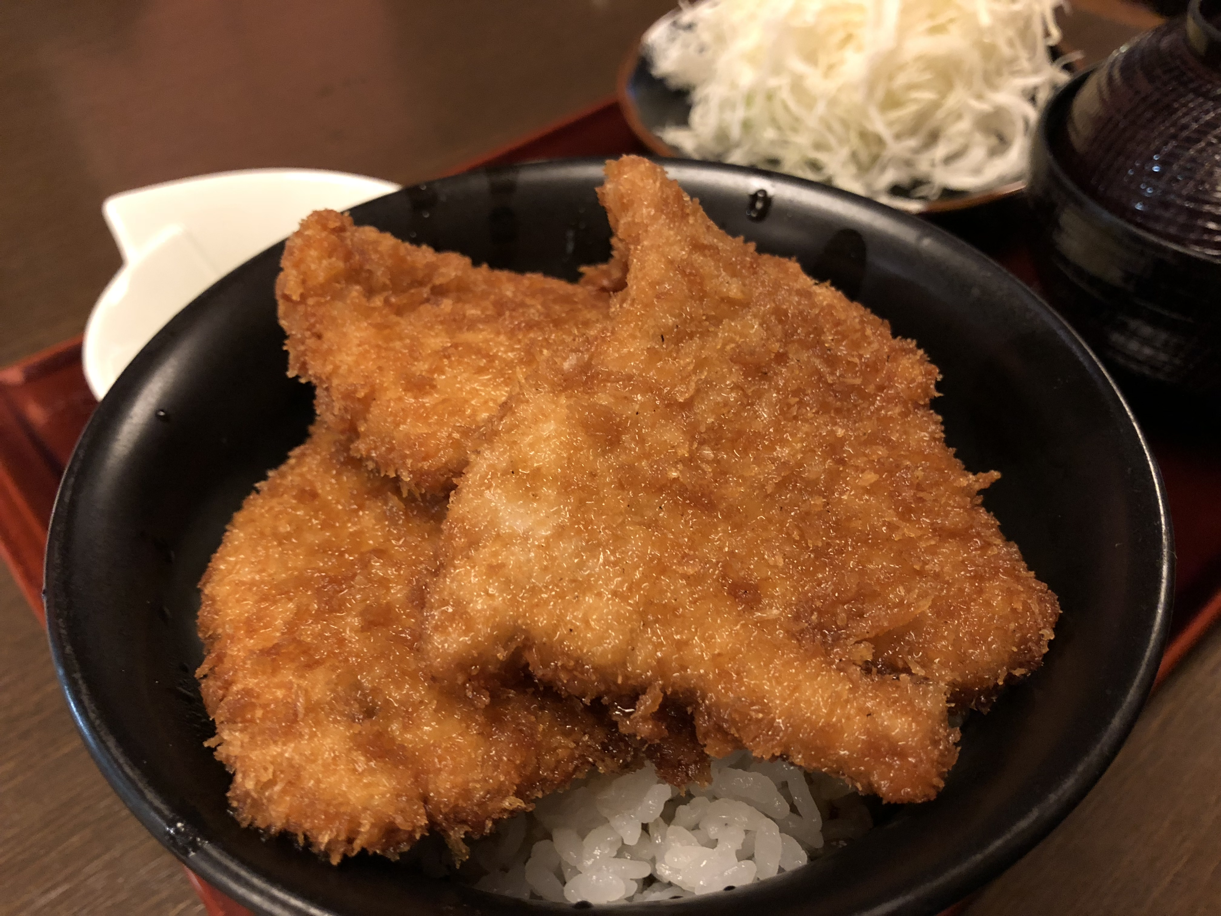 政家のたれja:カツ丼